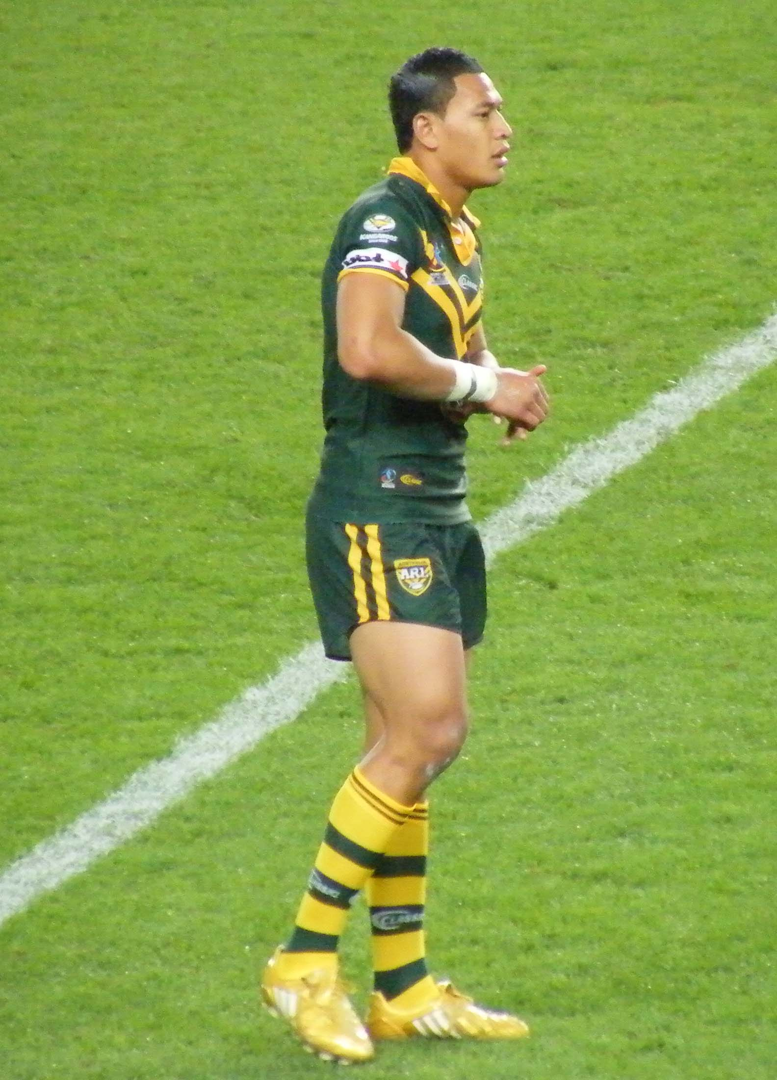 Australian centre Israel Folau. RLWC 2008.